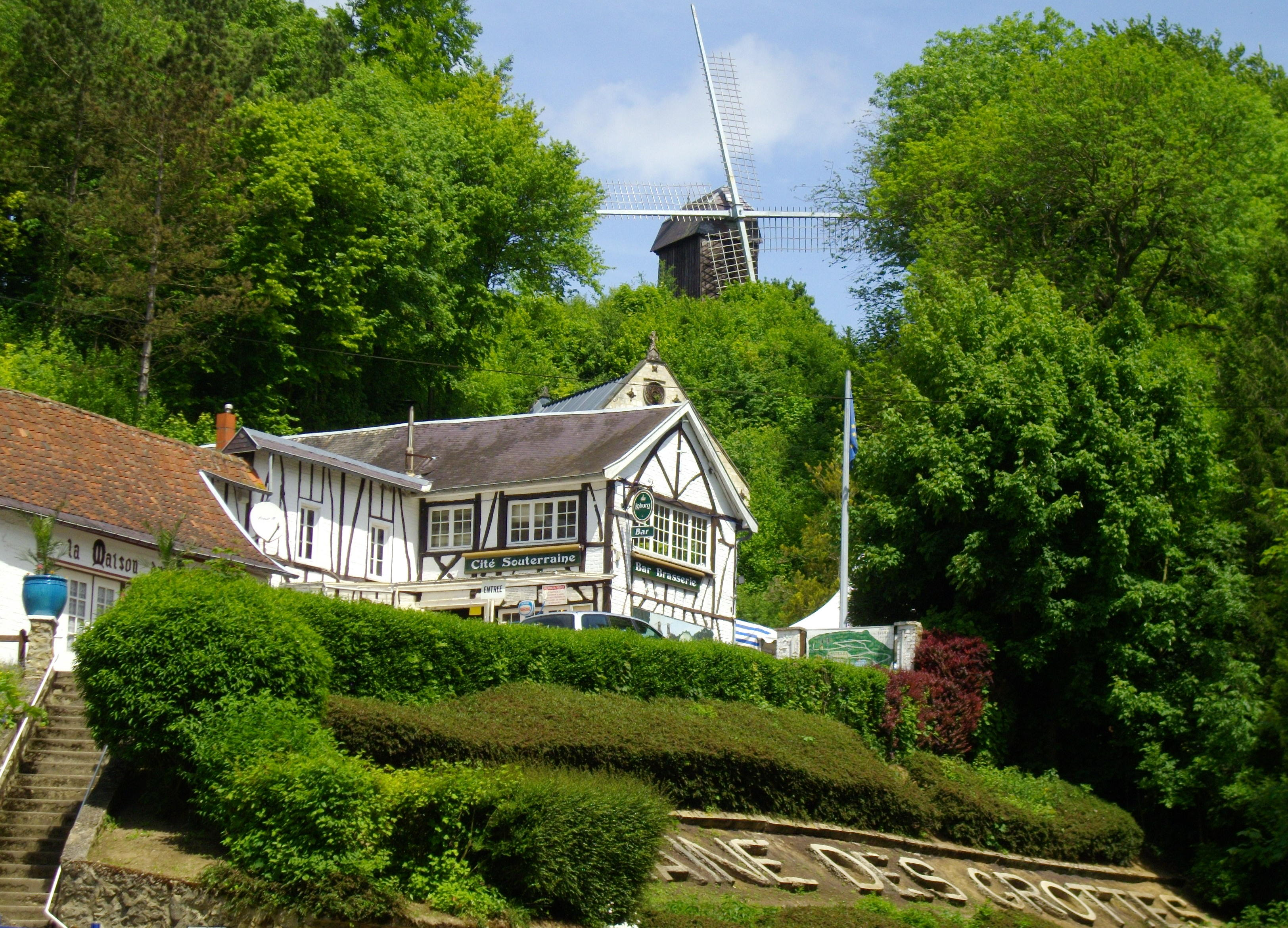 Entrée des Grottes de Naours (Somme)